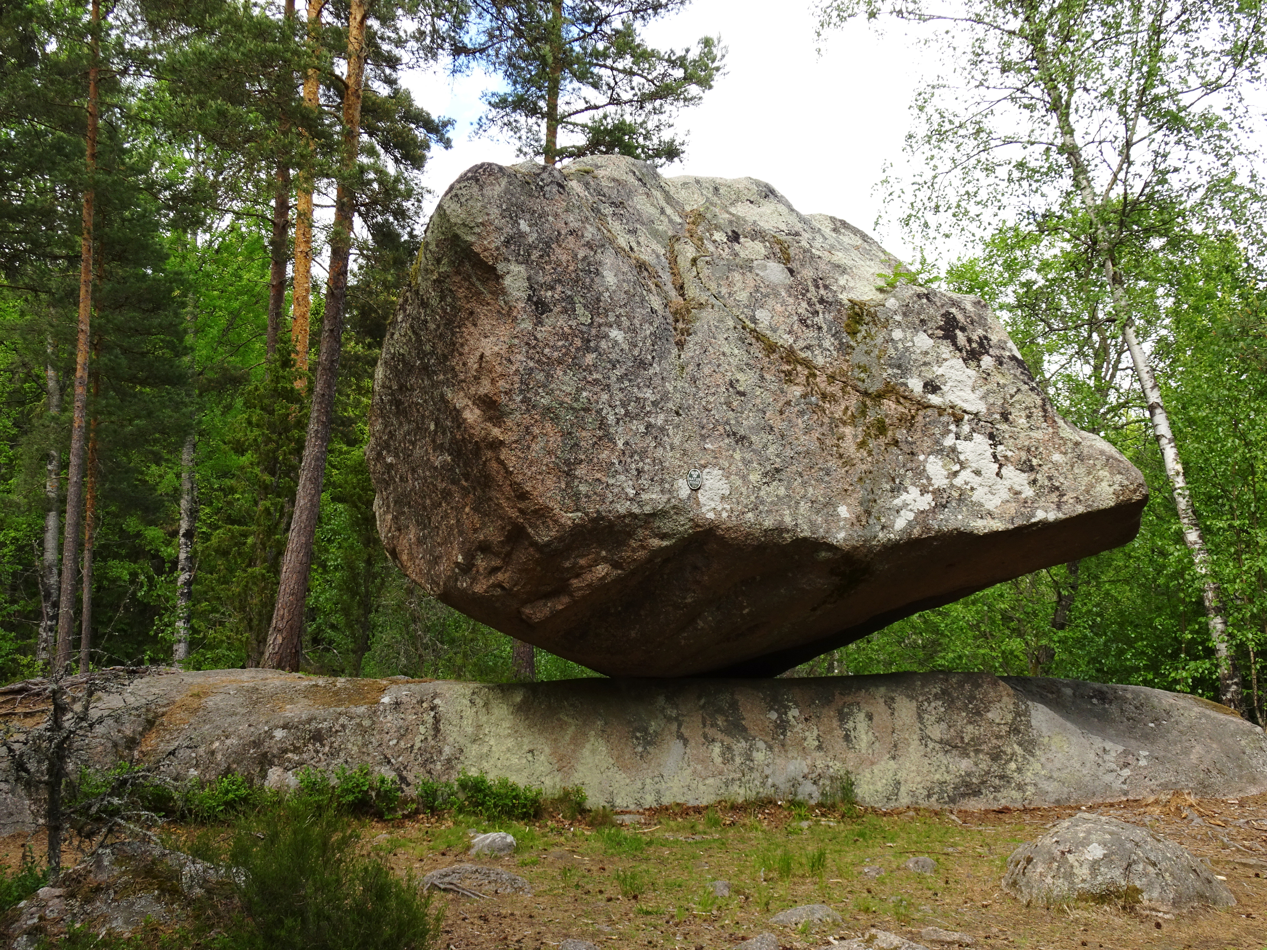 Runkesten, Rumskulla socken (RAÄ-Nummer: Rumskulla 51:1)